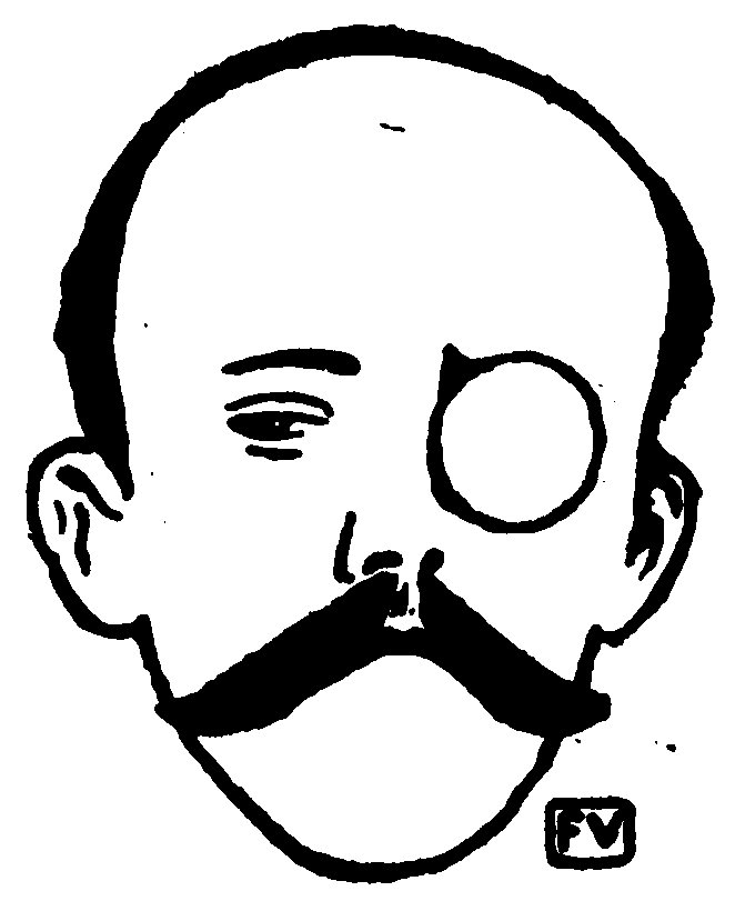 Portrait of French writer and poet Henri de Régnier (1864-1936) from Le Livre des masques (vol. II, 1898) by Remy de Gourmont (1858-1916)